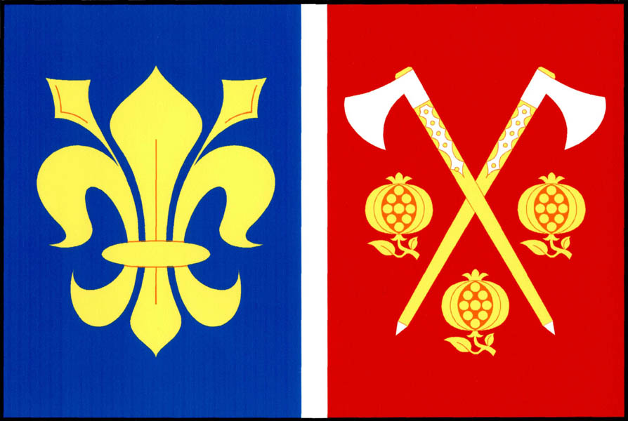 Vlajka obce Pocinovice